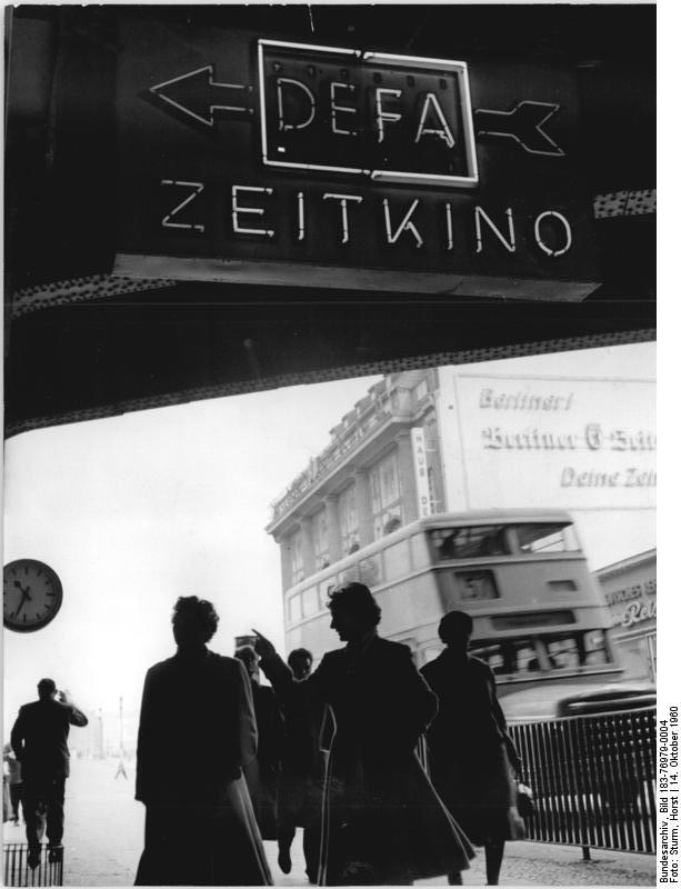 Berlin, DEFA-Zeitkino, Leuchtreklame Zentralbild Sturm 14.10.1960 Brüggemann Am Bahnhof Friedrichstrasse. Unterhaltung während der Wartezeit bietet das DEFA-Zeitkino.